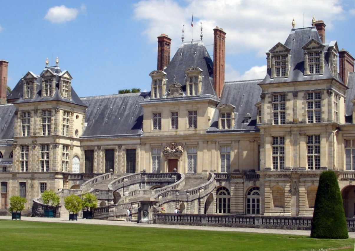 Grand Escalier en fer-à-cheval (en double fer-à-cheval), Cour du cheval blanc, Château de Fontainebleau, France.